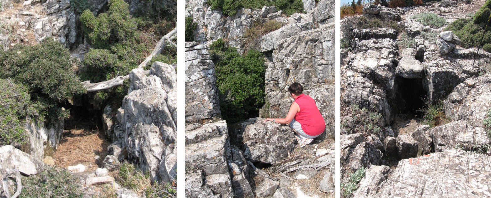 Grubenmundlöcher südlich des Klisidi-Gipfels (Bereich TG 80 E)